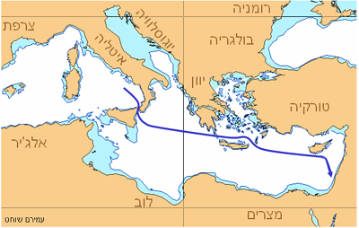 אוניית המעפילים עמירם שוחט - מסלול